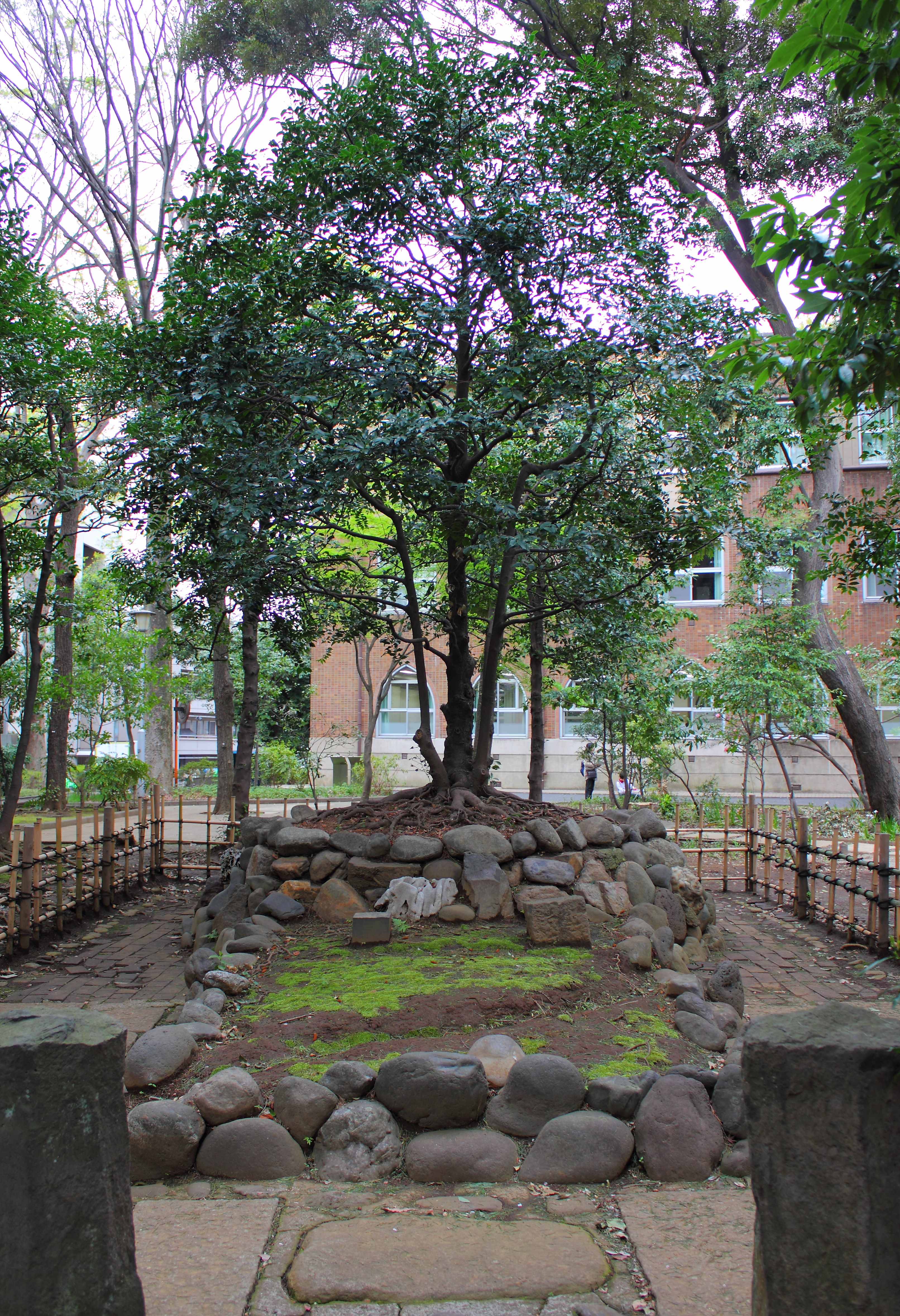 学習院大学、御榊壇